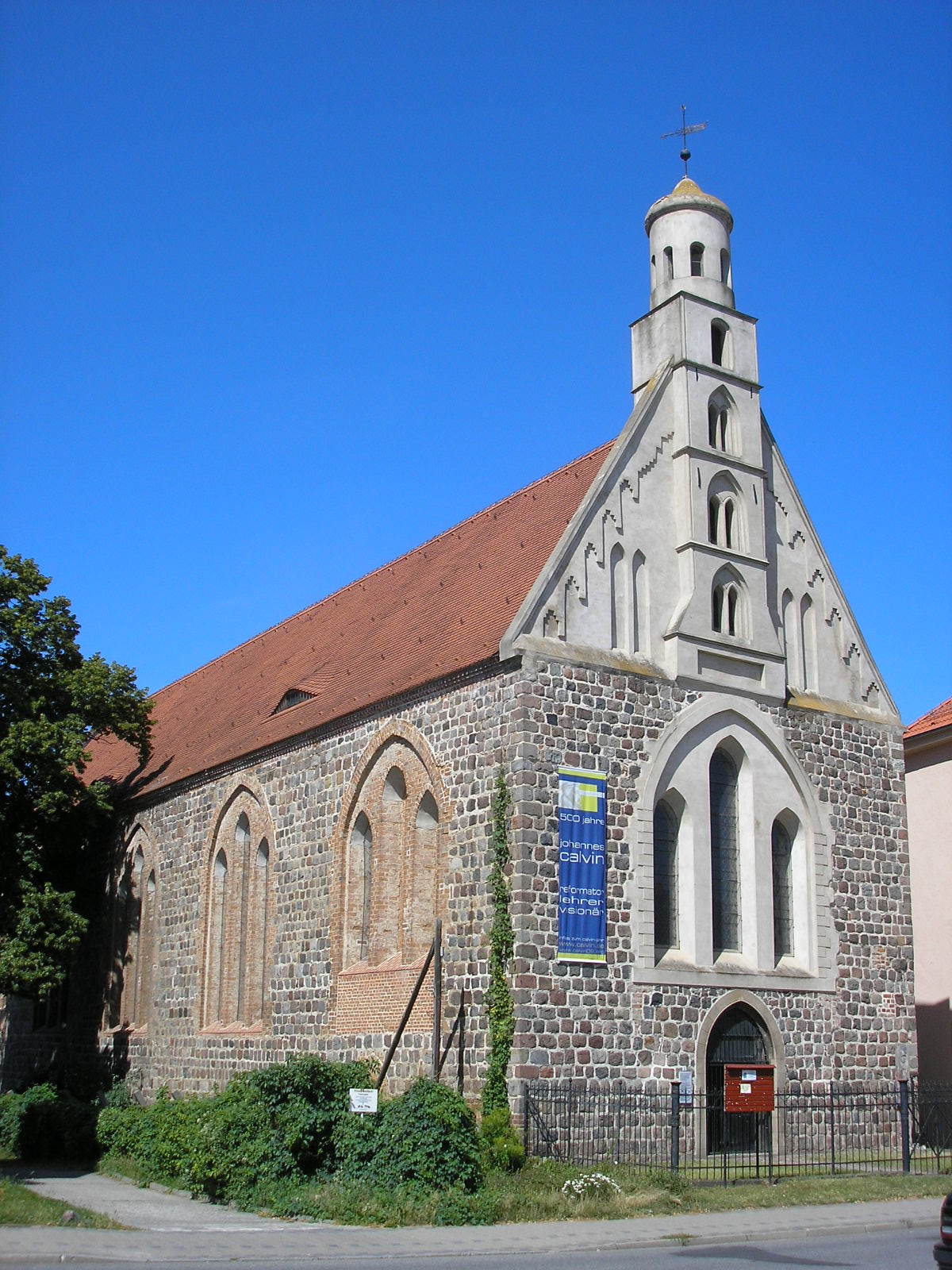 Die reformierte Dreifaltigkeitskirche (ehem. Franziskanerkirche St. Johannes Baptista) in Prenzlau (Brandenburg).